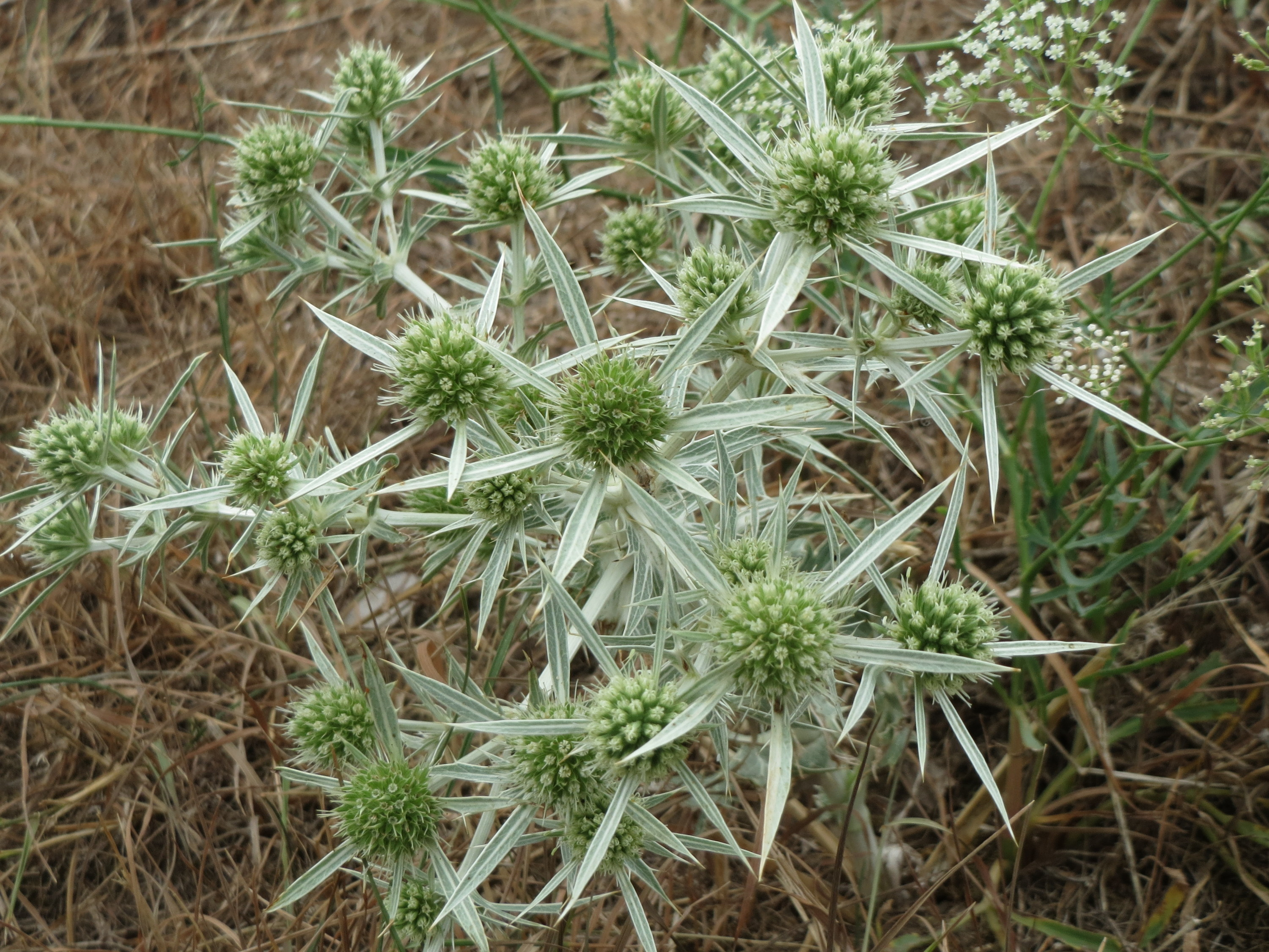 Feld-Mannstreu (Eryngium campestre) an der Steinern Straße (Elisabethenstraße) bei Mainz-Kastel